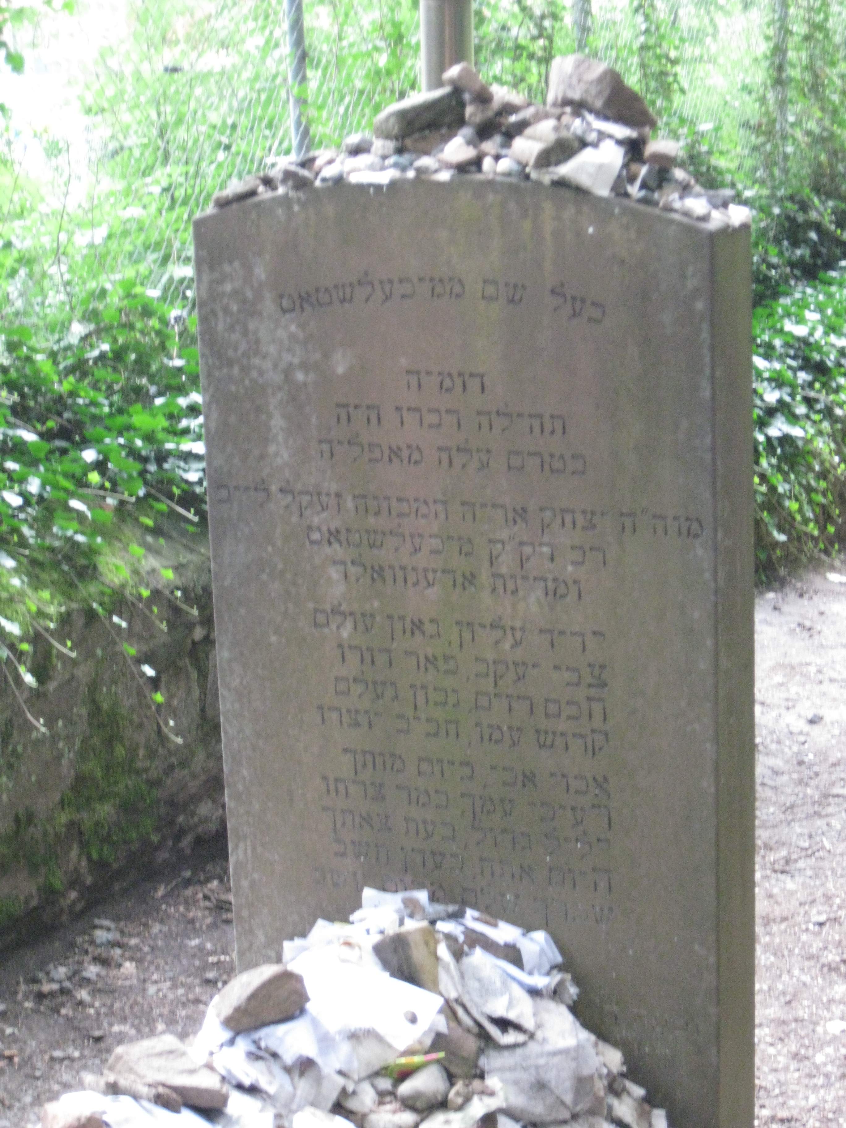 Grab des Seckel Löb Wormser auf dem jüdischen Friedhof in Michelstadt